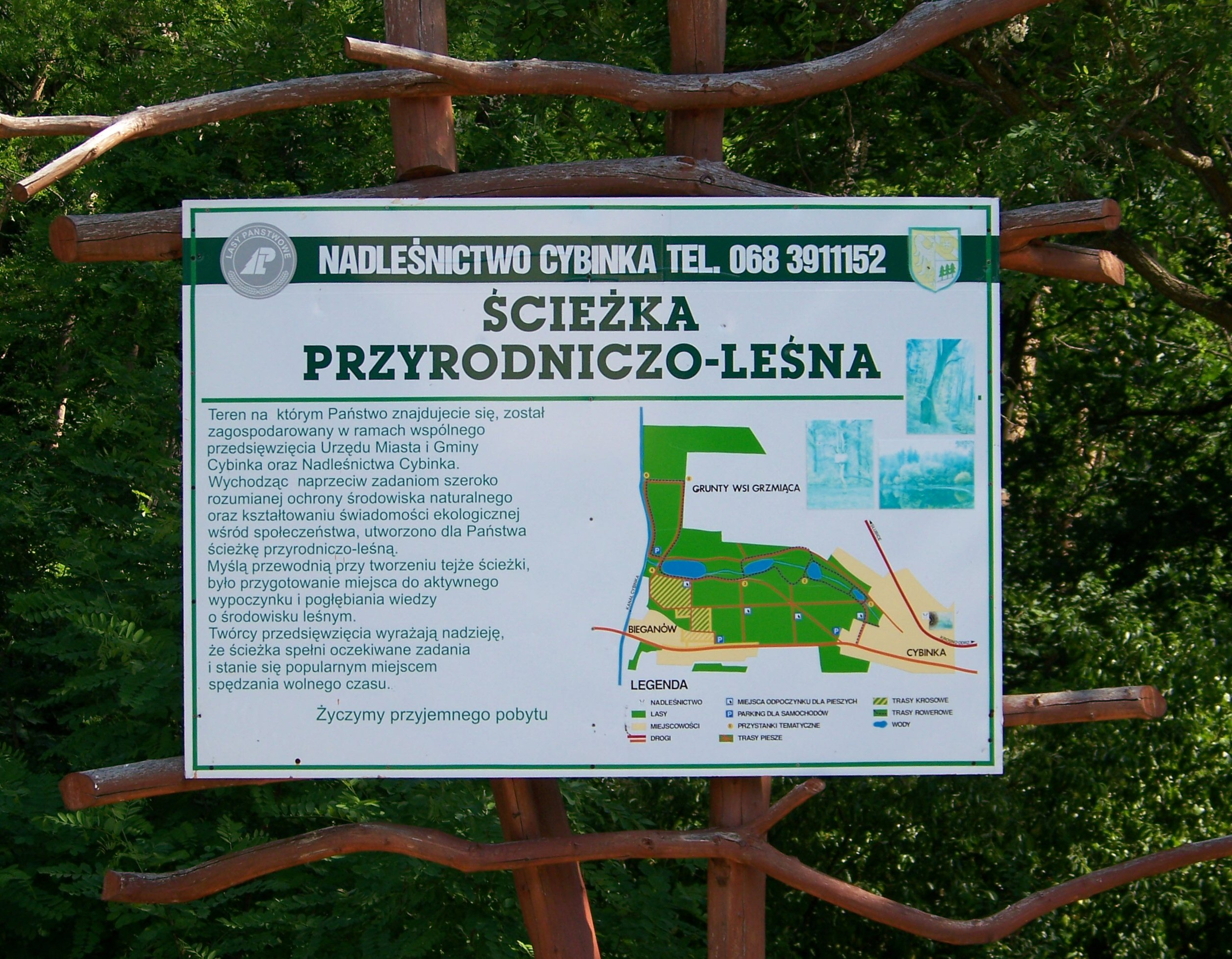 Ścieżka Przyrodniczo - Edukacyjna "Bieganów"